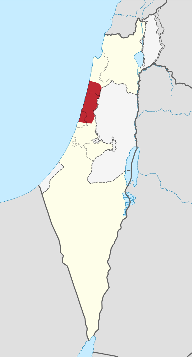 Israeli Coastal Plain region